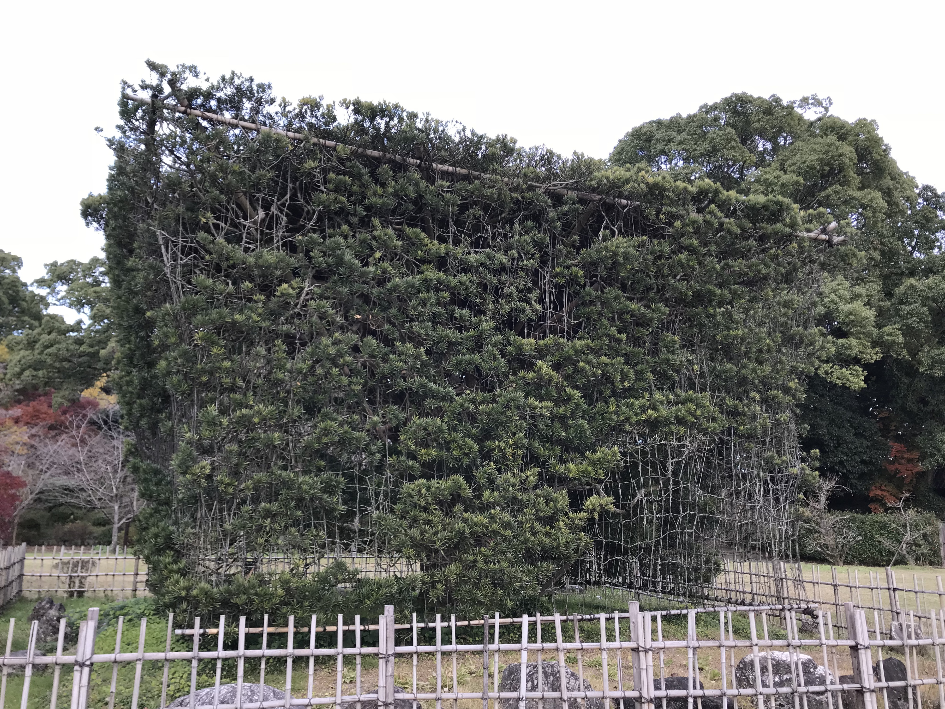 小城公園の大角槙